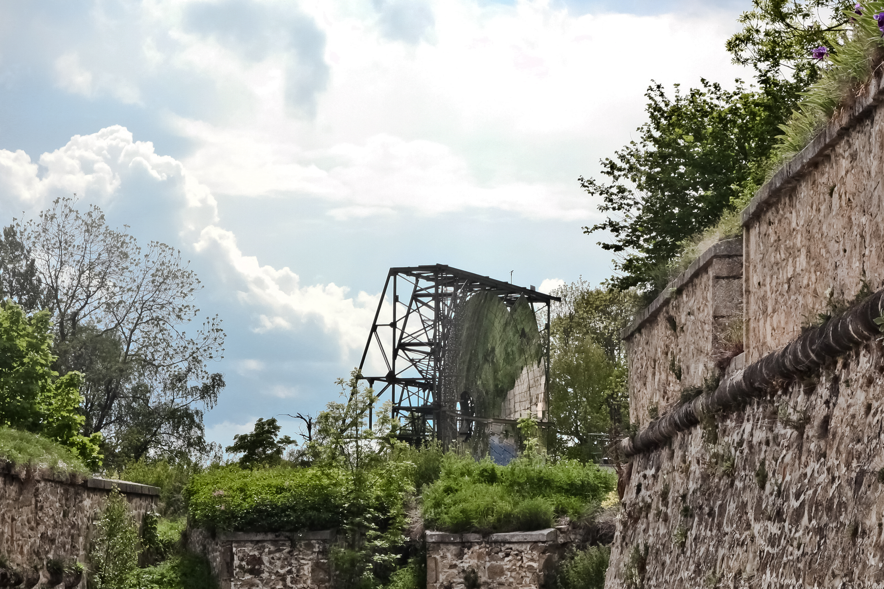 Four solaire de Mont-Louis .